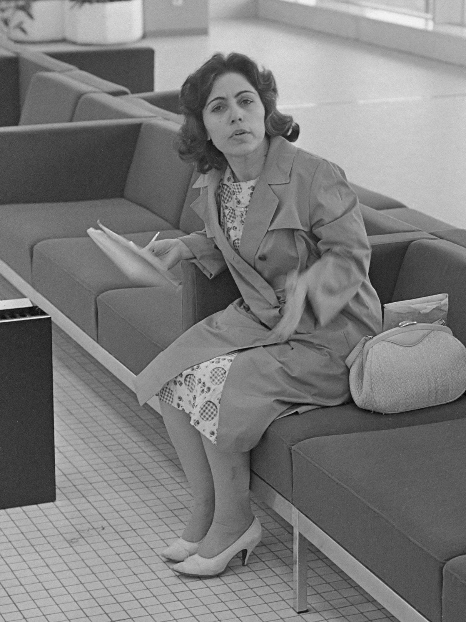 Yvonne Paul 22 dagen op Schiphol. Yvonne Paul in de vertrekhal 1 november 1967